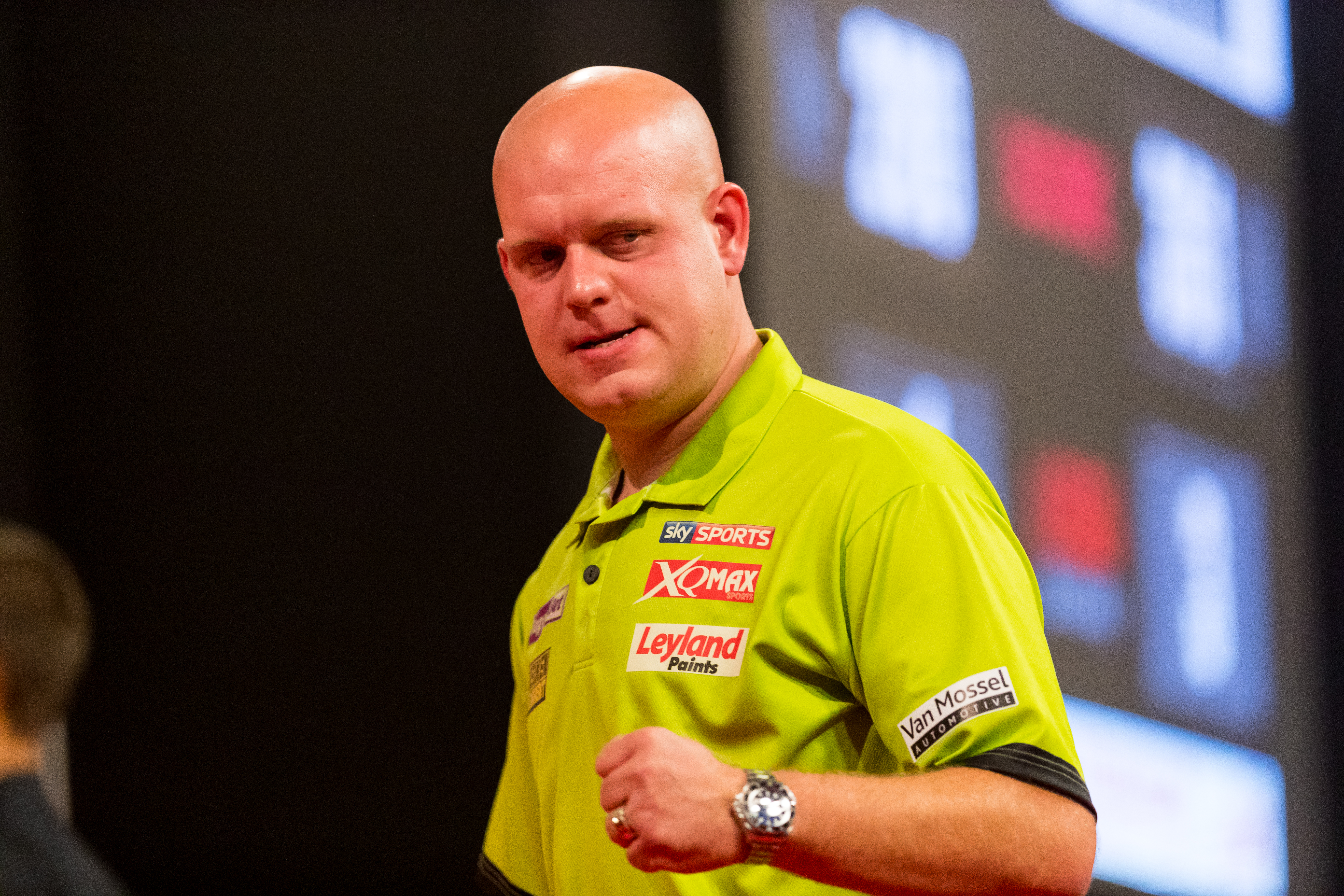 [9] Jelle Klaasen (NED) 1:6 [1] Michael van Gerwen (NED) during Professional Darts Corporation (PDC), German Darts Grand Prix (GDGP) at Maimarkthalle, Mannheim, Baden-Württemberg, Germany on 2017-09-10, Photo: Sven Mandel